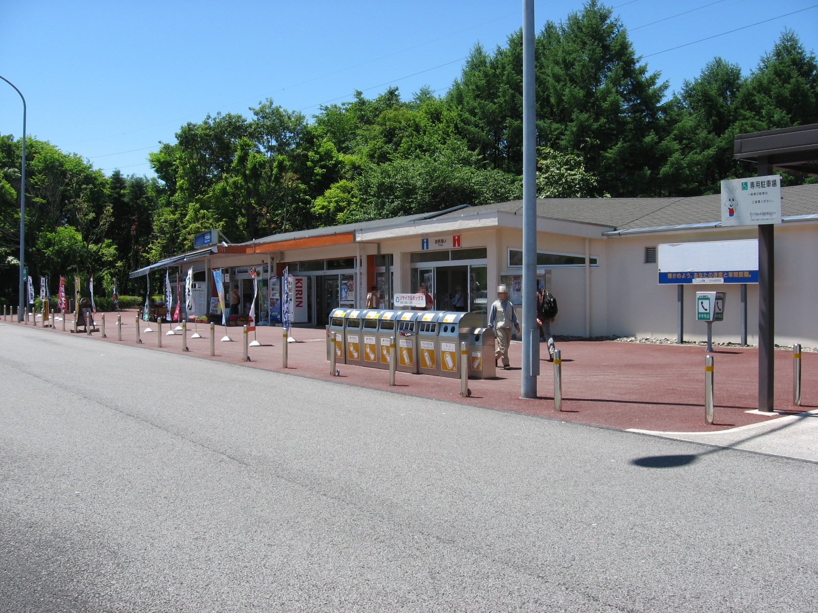 中央道原PA